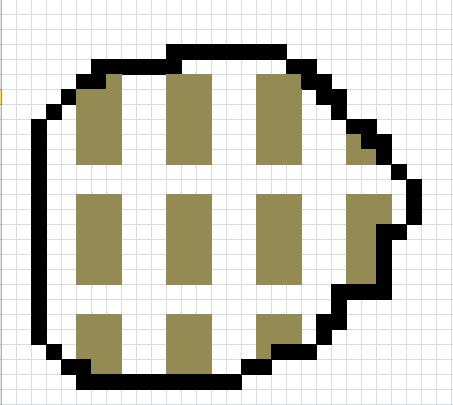 Line Plot Sampling pada kawasan hutan